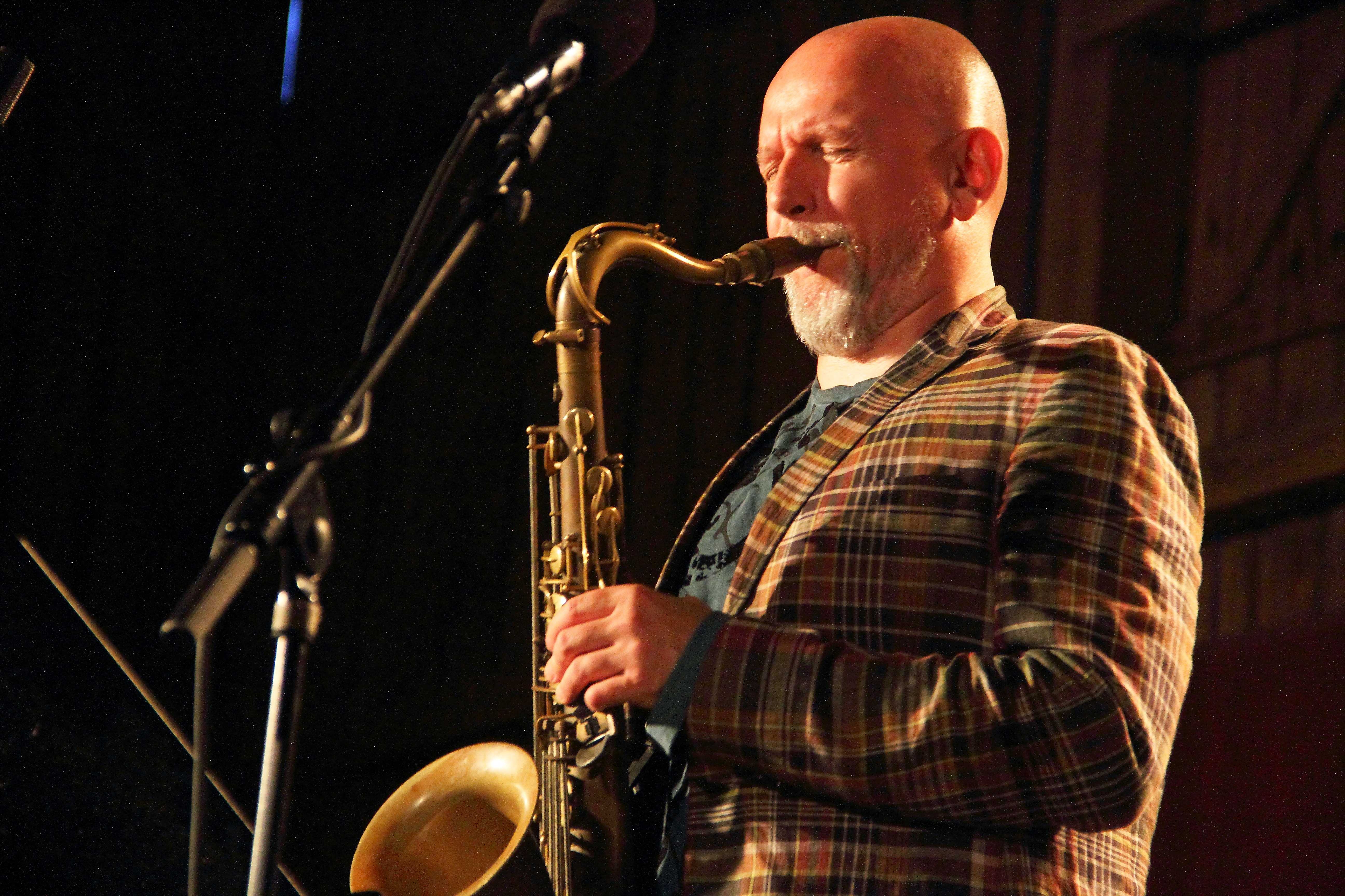 Miroslav Vitouš & Adam Pierończyk beim INNtöne Jazzfestival 2017